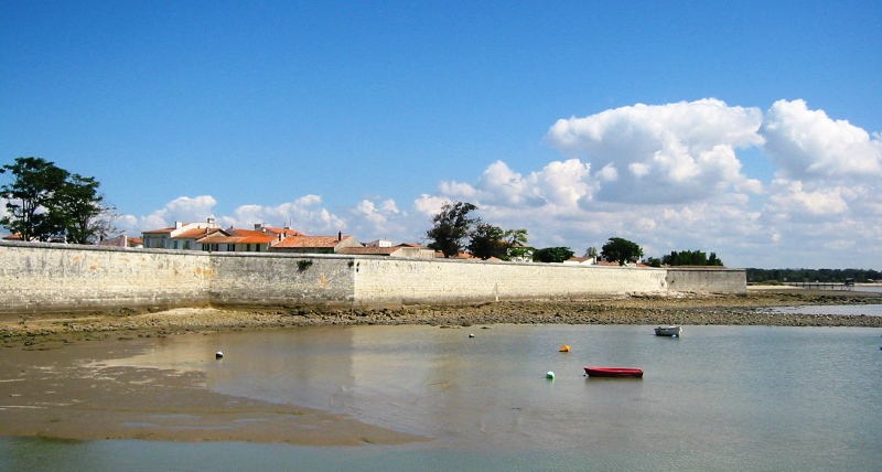 Ile d'Aix, France.